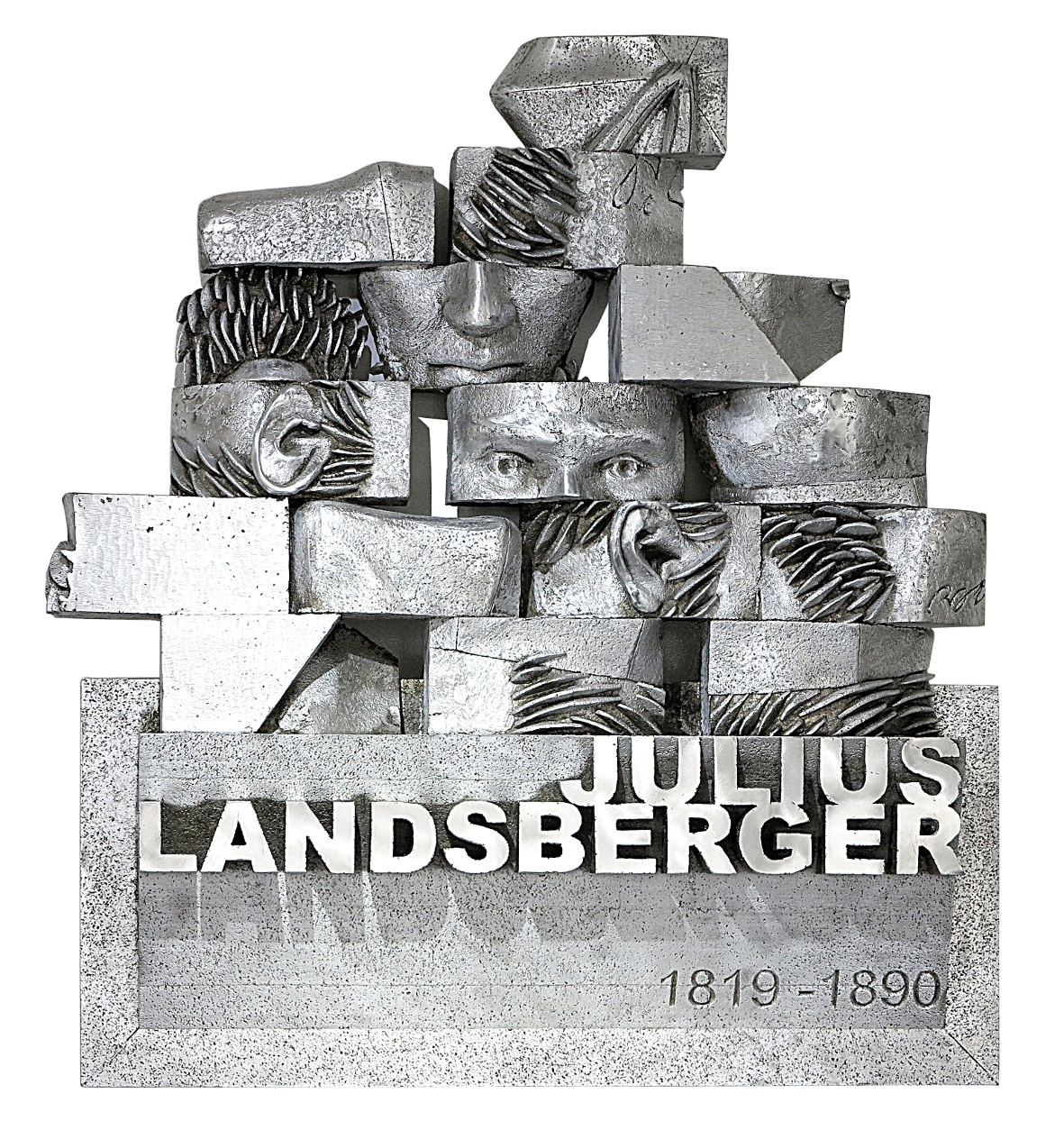 Gedenktafel Julius Landsberger (1819-1890). Teilpolierte Aluminiumskulptur von Gerhard Roese, 2013, Liberale Synagoge, Darmstadt